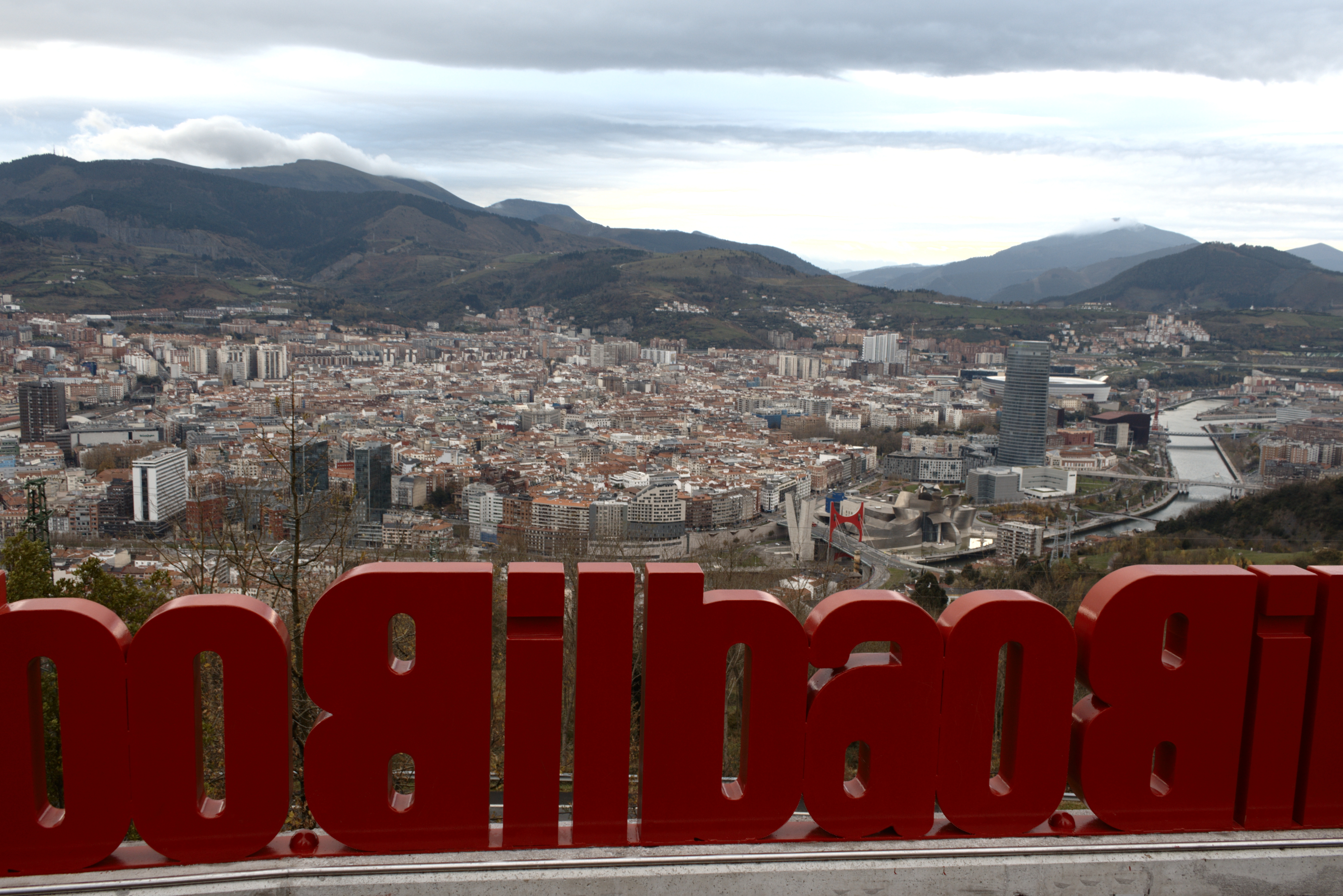 9111 MIRADOR